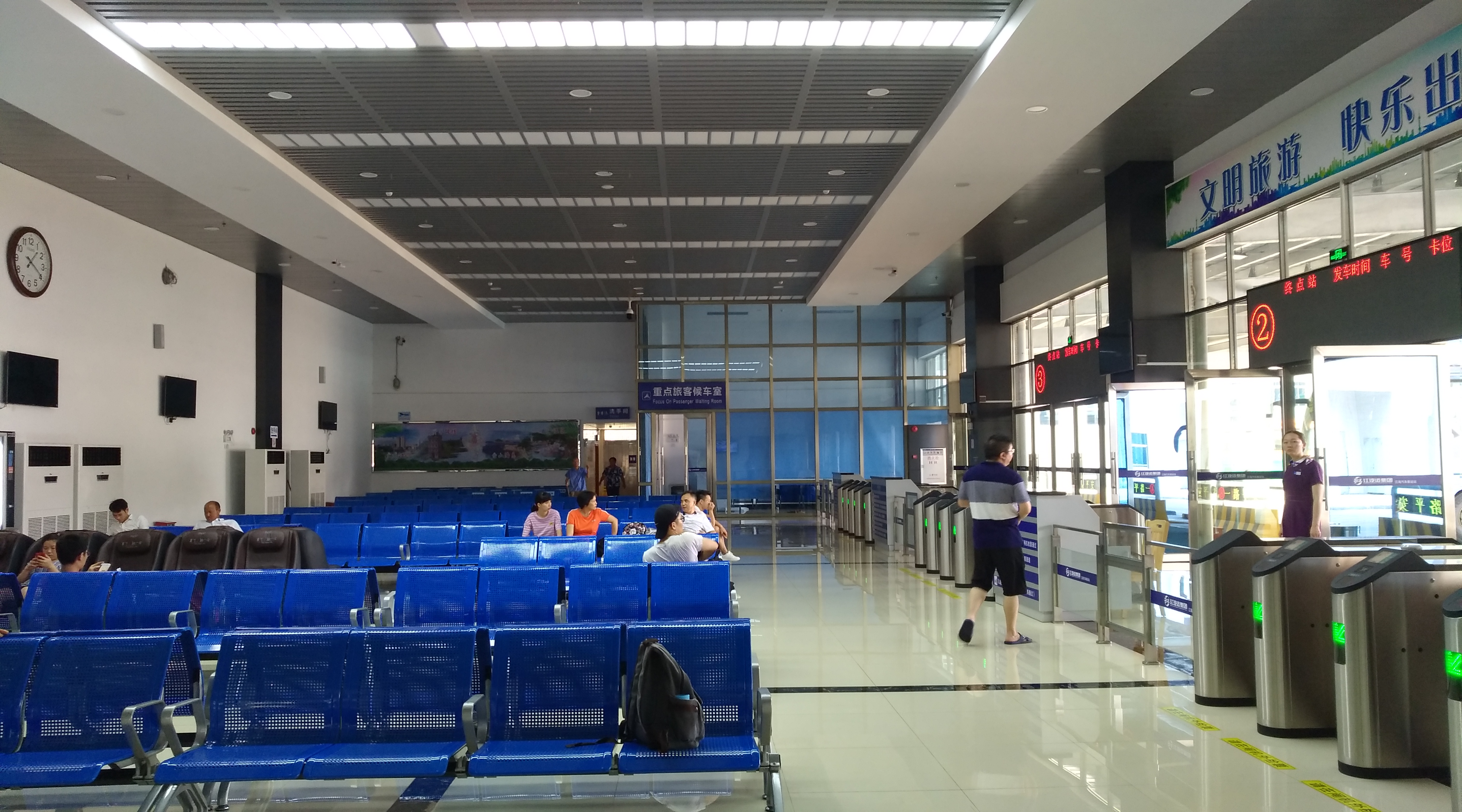 江门 江海汽车客运站 候车室